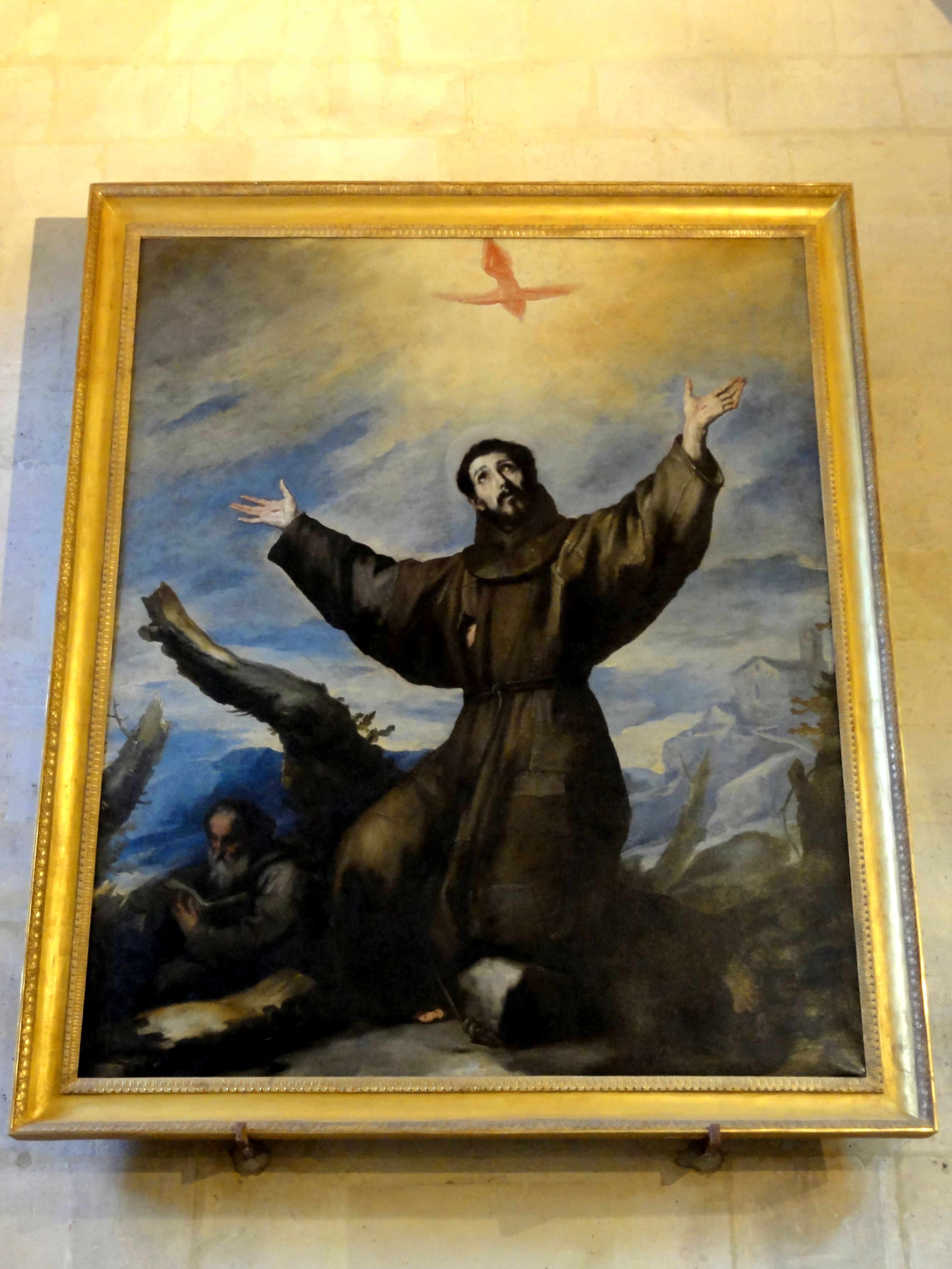 Tableau - Saint François d'Assise en extase, attribué à Ribera (1588-1652) puis plus récemment à Luca Giordano, offert à l'église de Gouvieux par le baron Erlanger le 4 septembre 1879.